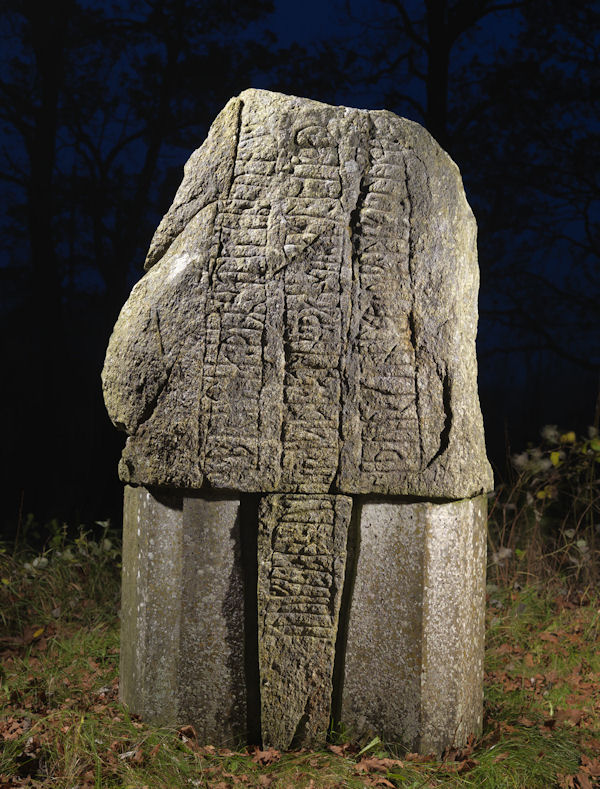 Randbøl-stenen. Foto: Nationalmuseet ved Roberto Fortuna